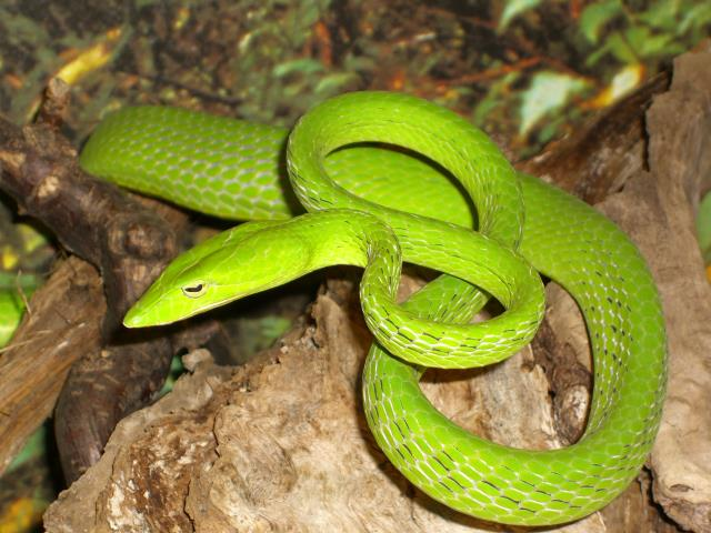 Trugnatter (Baumschnüffler), Ahaetulla mycterizans im Reptilienhaus Unteruhldingen, Deutschland.